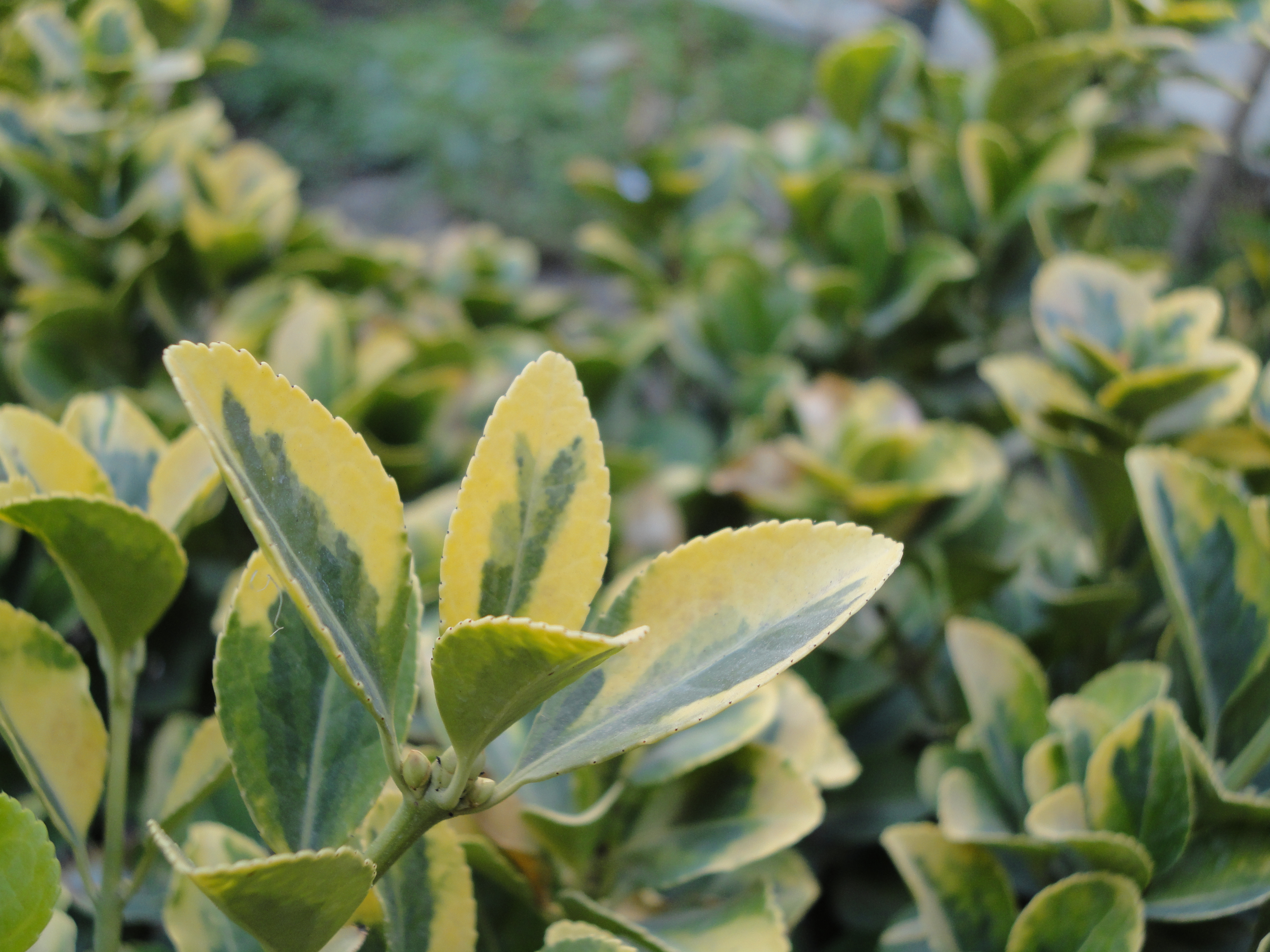 تصویری از گیاه شمشاد از عکاس قائمی پور